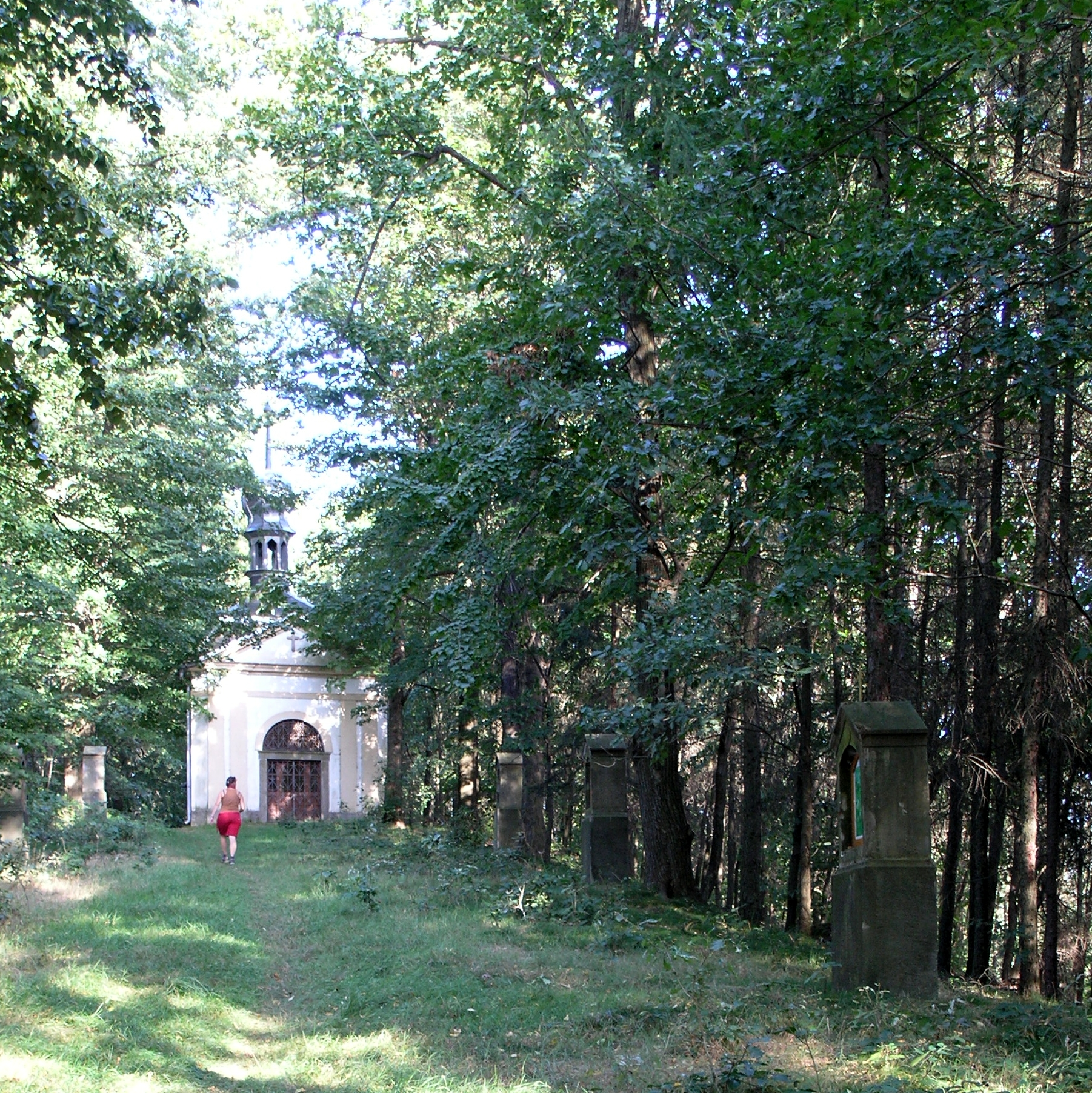 Brtníky - křížový vrch